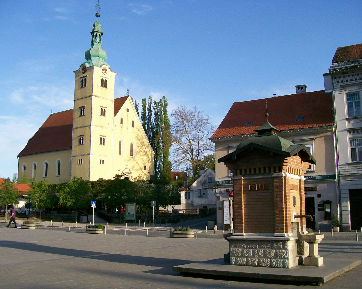 Samobor Trg kralja Tomislava, pogled na Crkvu sv. Anastazije